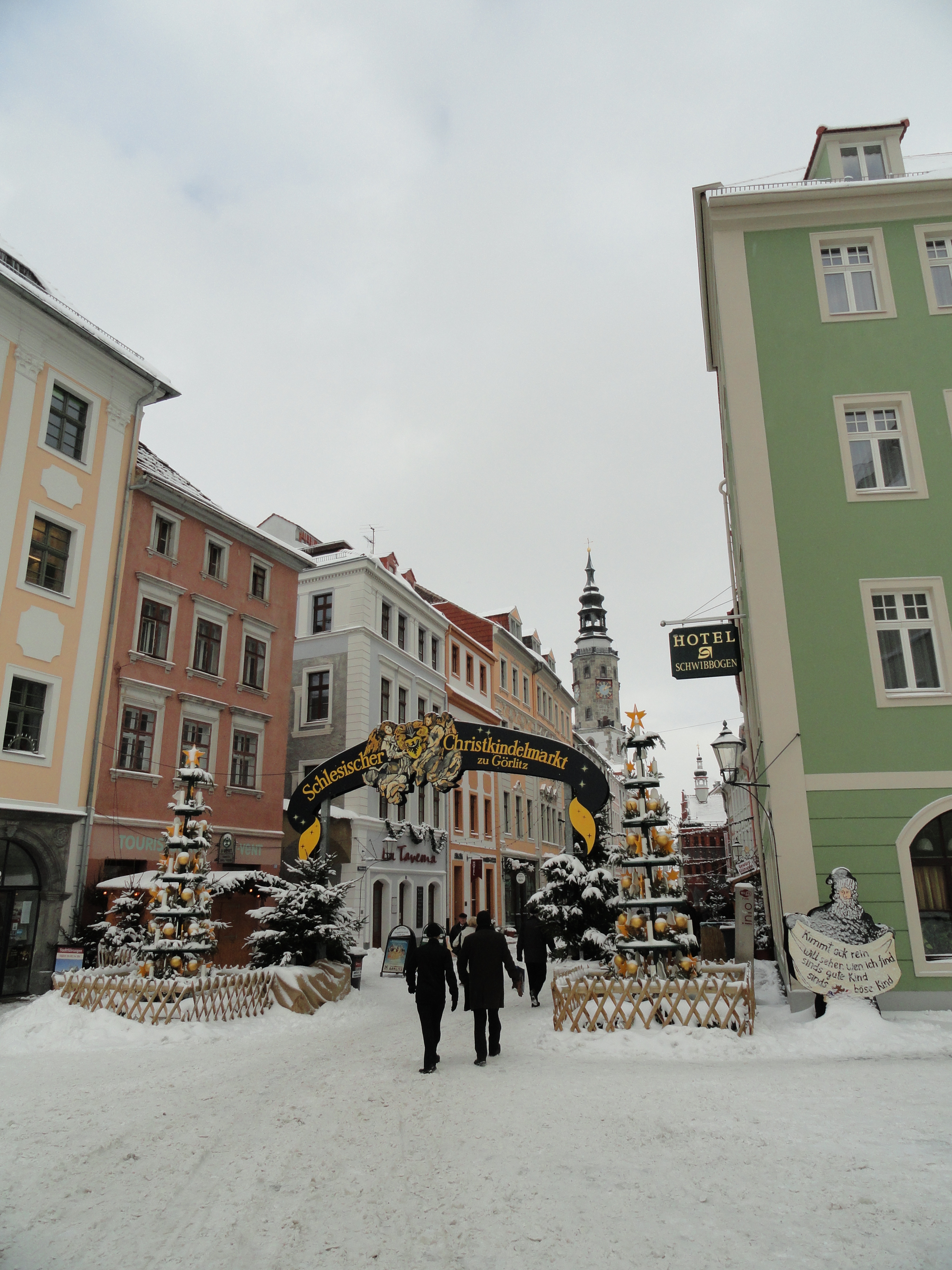 Schlesischer Christkindelmarkt auf der Brüderstraße in Görlitz